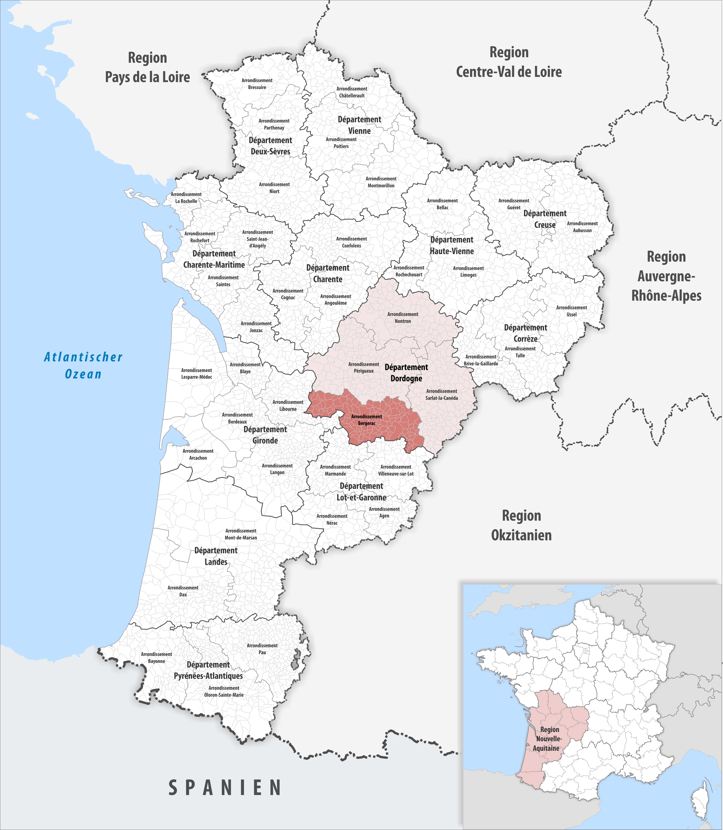 Lage des Arrondissements Bergerac